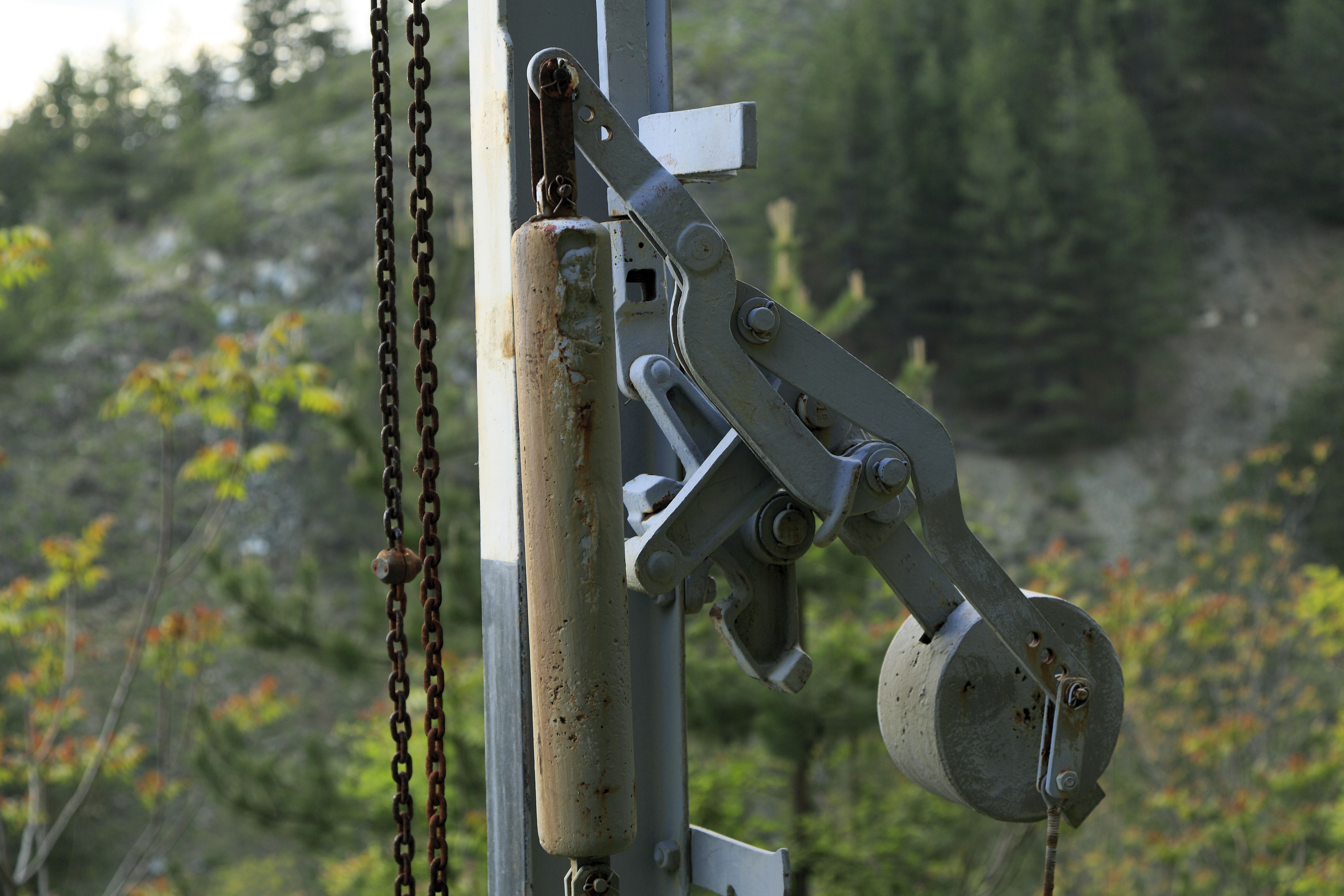 Sind beide Stränge unter Spannung, wirkt der Antrieb wie ein Waagebalken. Links ist der Zugdraht für die Fahrtstellung, rechts der für die Haltstellung angeschlossen. In Fahrtstellung steht der Waagebalken um etwa 90° verdreht. Reißt der Zugdraht, wird der Antrieb vom Nachlassdraht und dem runden Gewicht rechts in Warnstellung zurückgestellt. Reißt jedoch der Nachlassdraht, fehlt der Zug auf dem rechten Strang. Der Hebel klappt nach oben, der Hebel des Zugdrahtes wird dadurch getrennt und das Gewicht auf der rechten Seite zieht das Signal in Warnstellung. Auf gleiche Weise wird verhindert, dass das Signal bei Drahtbruch in Grundstellung fälschlicherweise in Fahrtstellung kommt. Der gegossene Hebel hinter dem dritten Schenkel des Antriebshebels verriegelt die Scheibe in beiden Endlagen und gleicht Hubverlust aus.